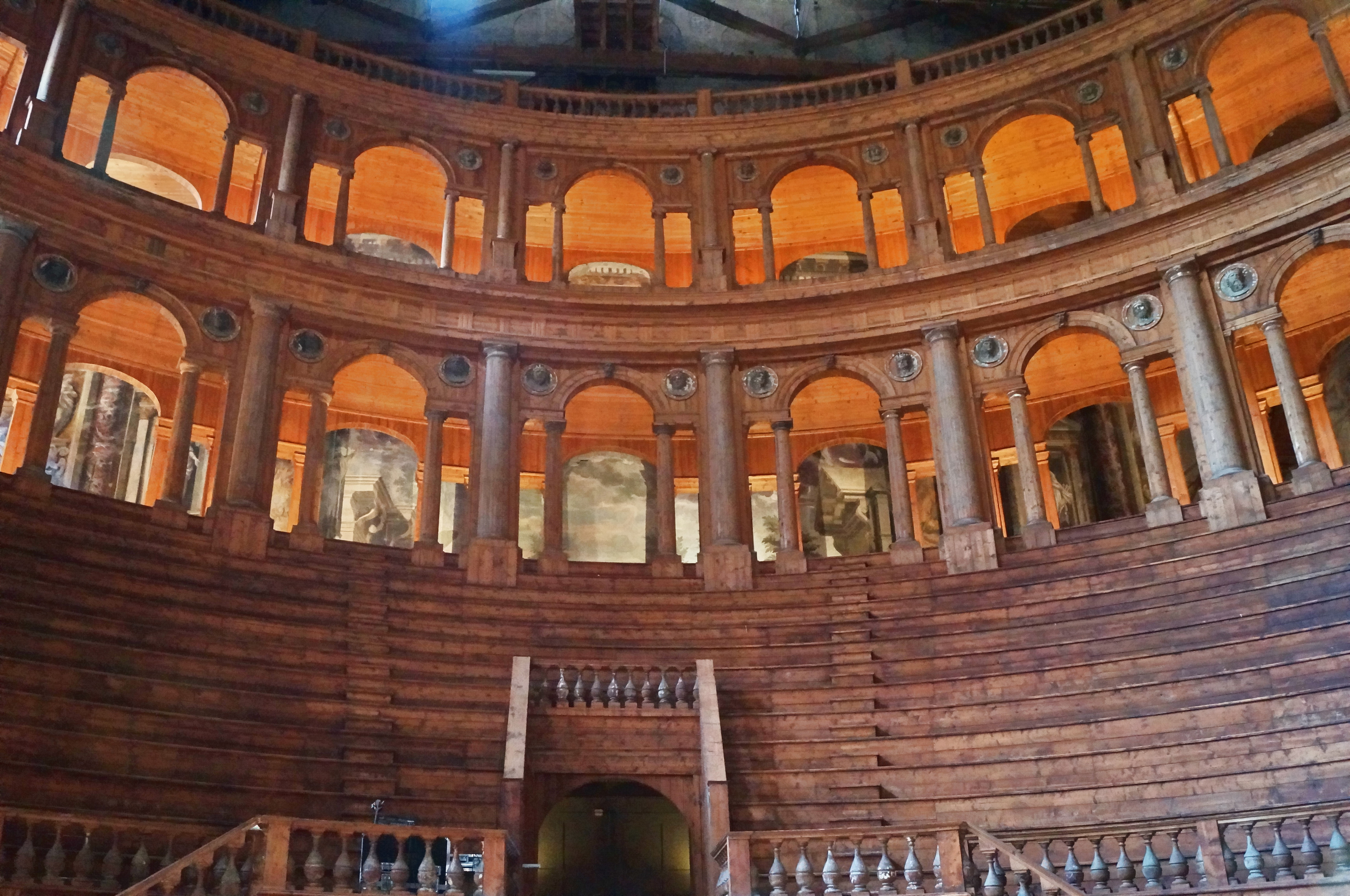 Teatro Farnese This is a photo of a monument which is part of cultural heritage of Italy.